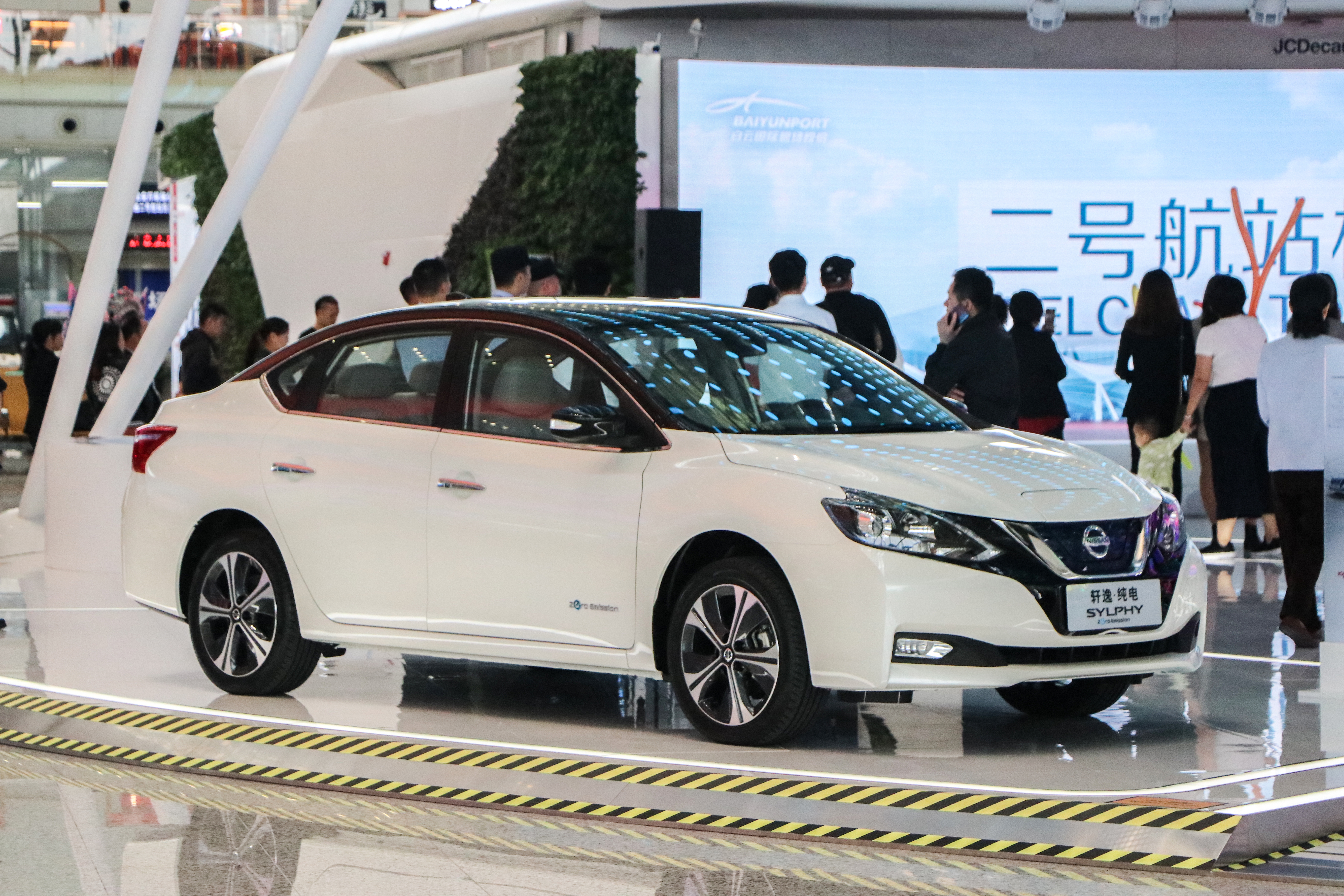 东风日产轩逸纯电